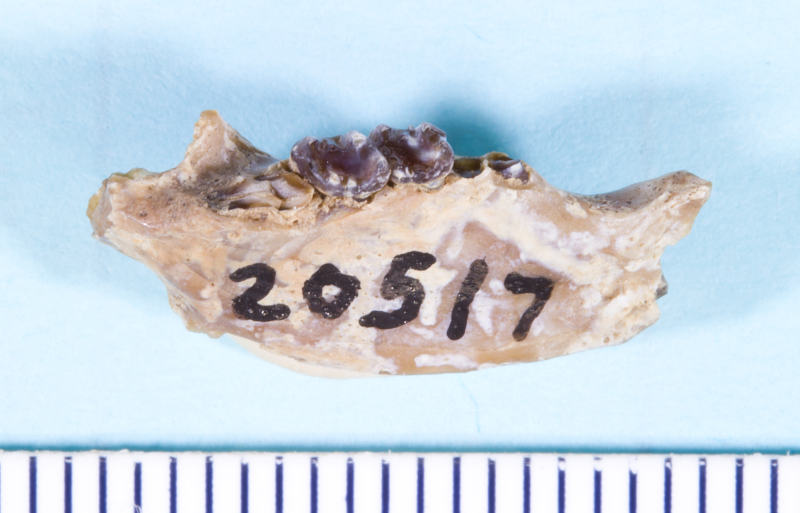 Prosciurus albiclivus c.f. Korth, 1994